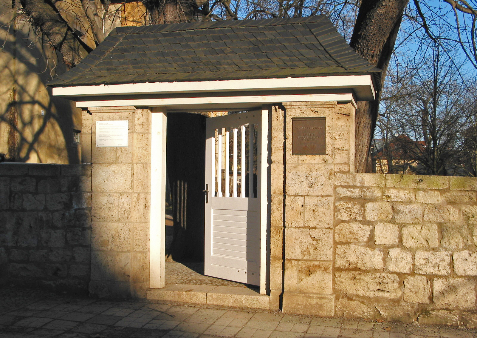 Das Eingangsportal zum Jakobskirchhof, der ältesten Begräbnisstätte Weimars.